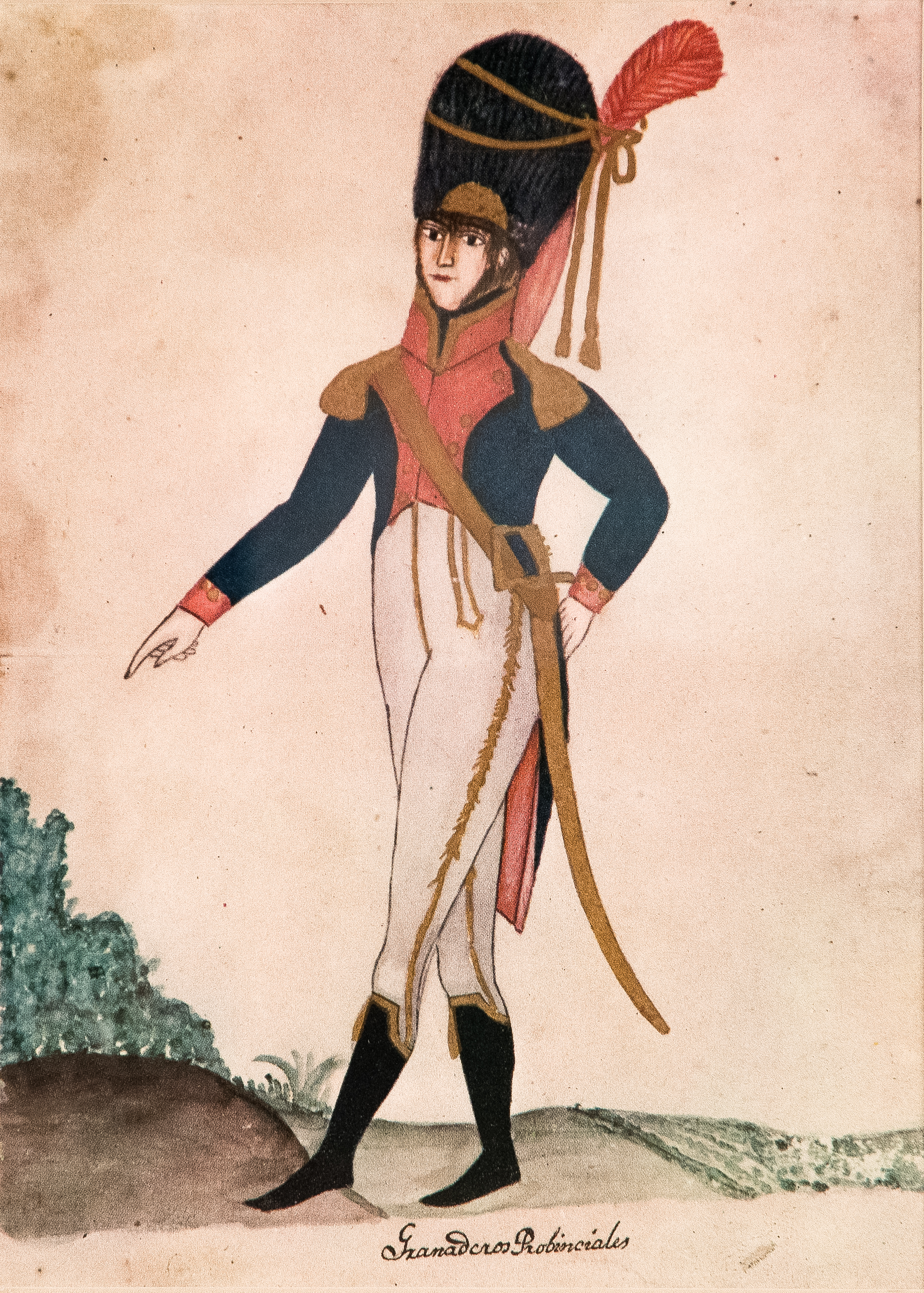 Serie de acuarelas originales de la época de la Independencia de la Argentina de soldados de los Regimientos Patriotas.